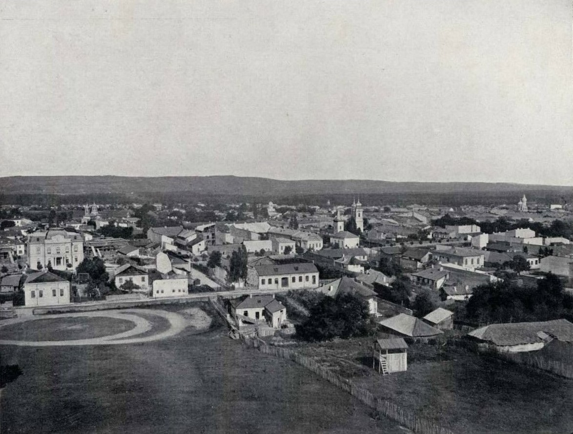 Piteşti